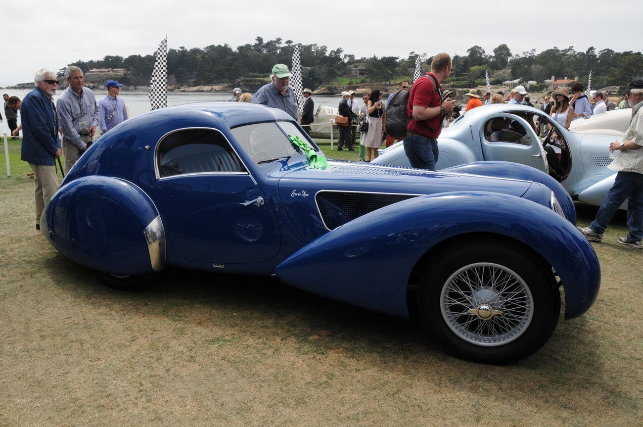 Talbot-Lago T150C-SS coupé 1939 by Marcel Pourtout, Pebble Beach Concours d'Elégance 2014 from the plate on the car: TALBOT Type T150C No 90120 33 Quai du General Gallieni, Suresnes France